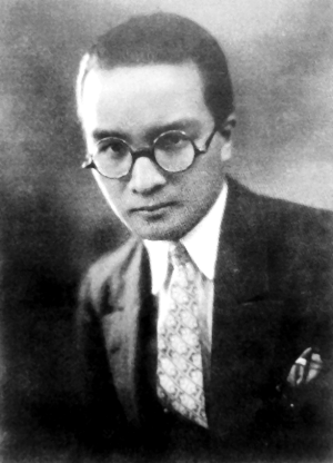 中文（台灣）: 詩人李金髮